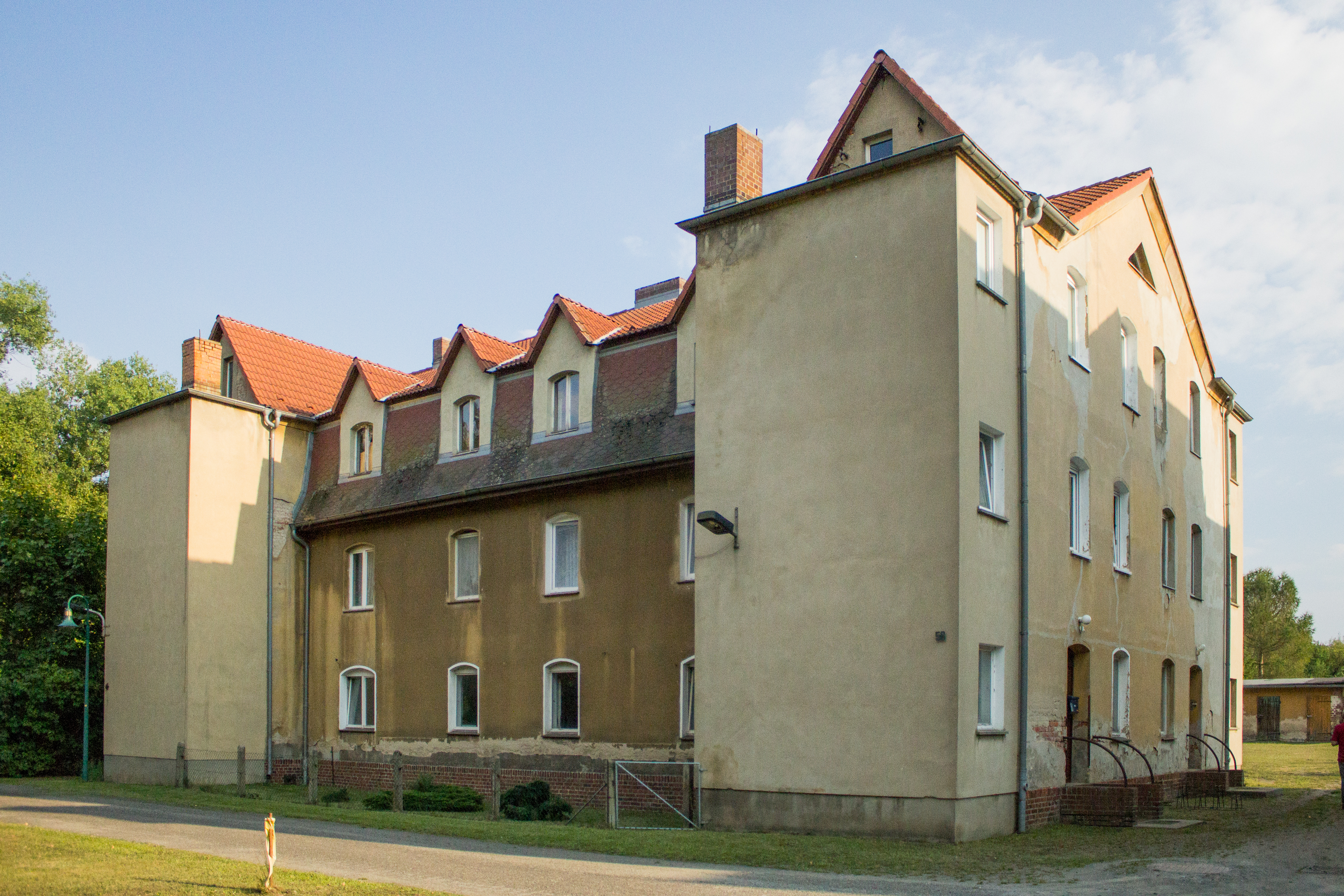 Gebäude Waldstraße, Sibirien (Welzow)